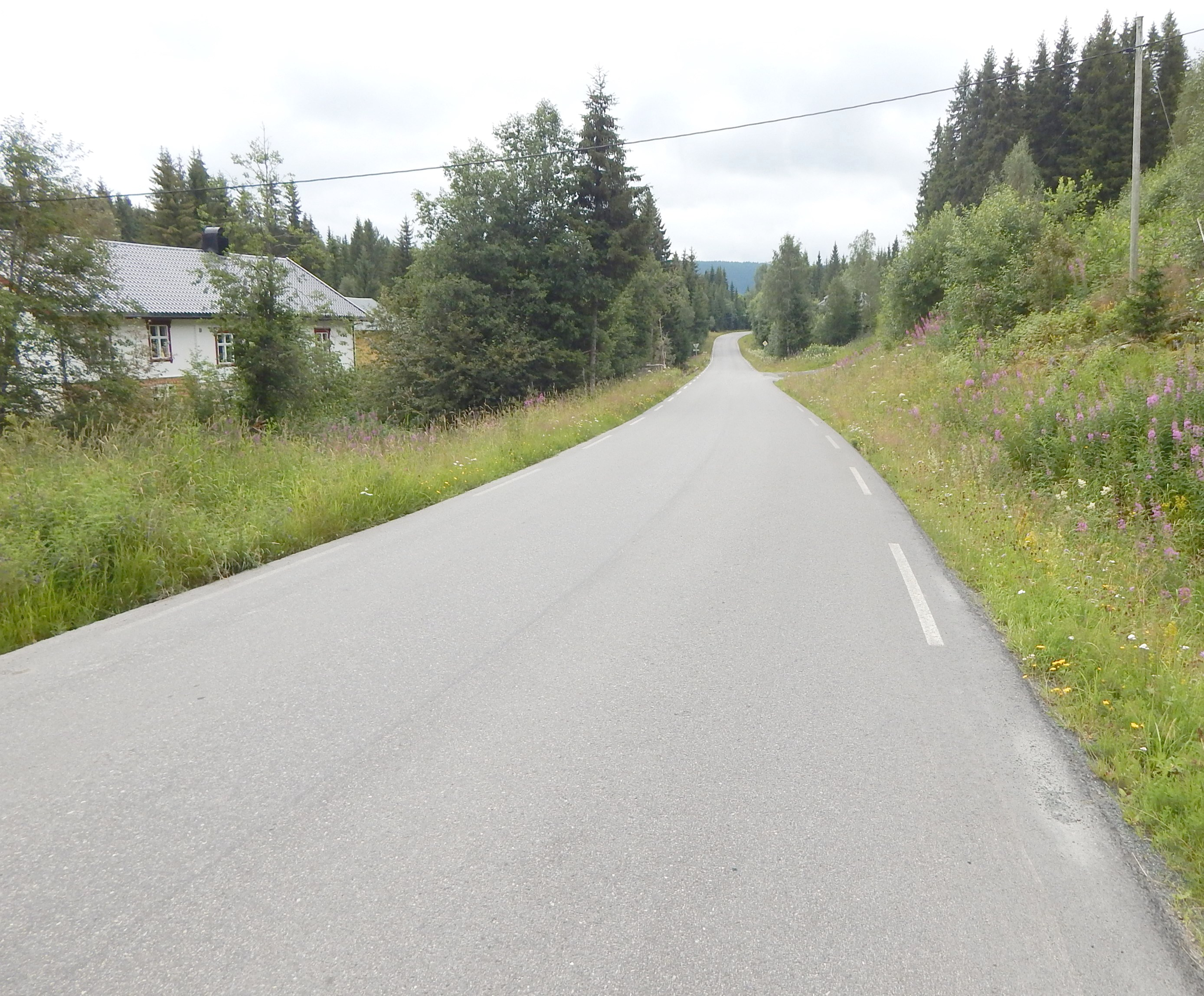 Gravåsvegen (fylkesvei 2408, tidl. 155) nær nordenden mot Snertingdalsvegen (primær fylkesvei 249)